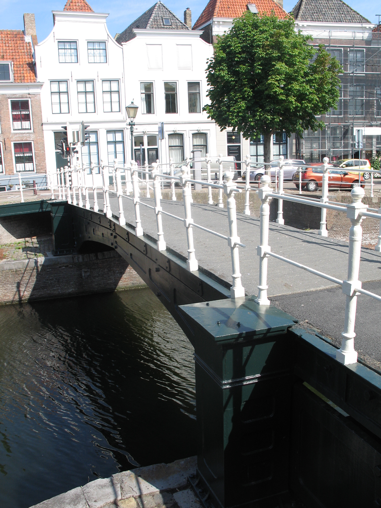 Rijksmonument in Middelburg Tweede foto Bellinkbrug met Louaansekaai op de achtergrond